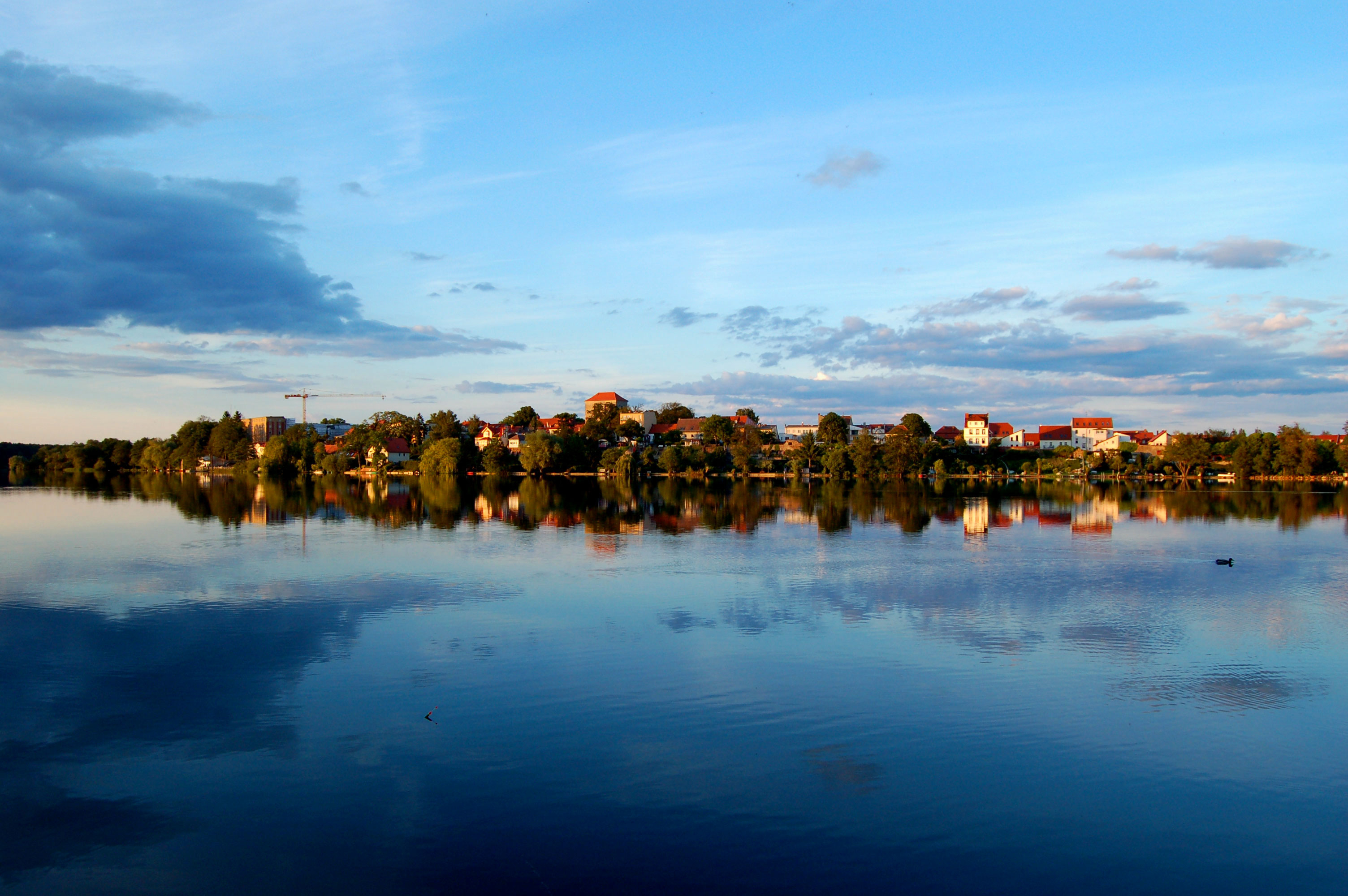 Spiegelung von Strausberg, Stadtansicht vom gegenüberliegenden Ufer des Straussees